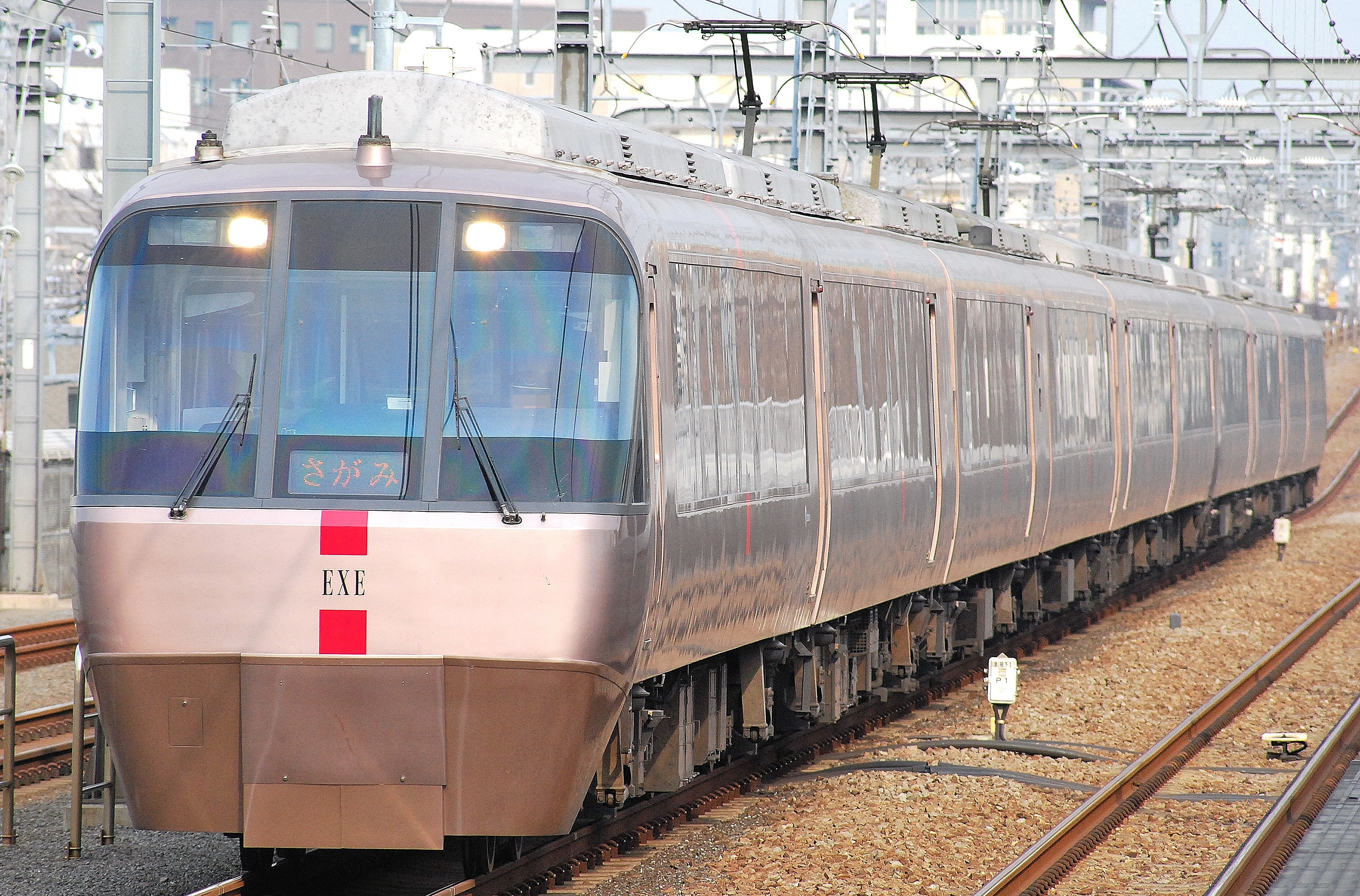 祖師ヶ谷大蔵駅を通過する小田急30000系。